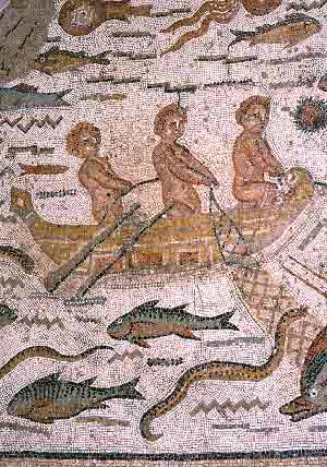 Mosaico Alcalaíno.